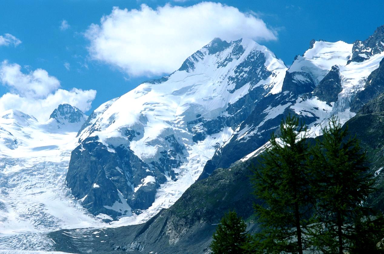 Piz Bernina, Eastern Alps